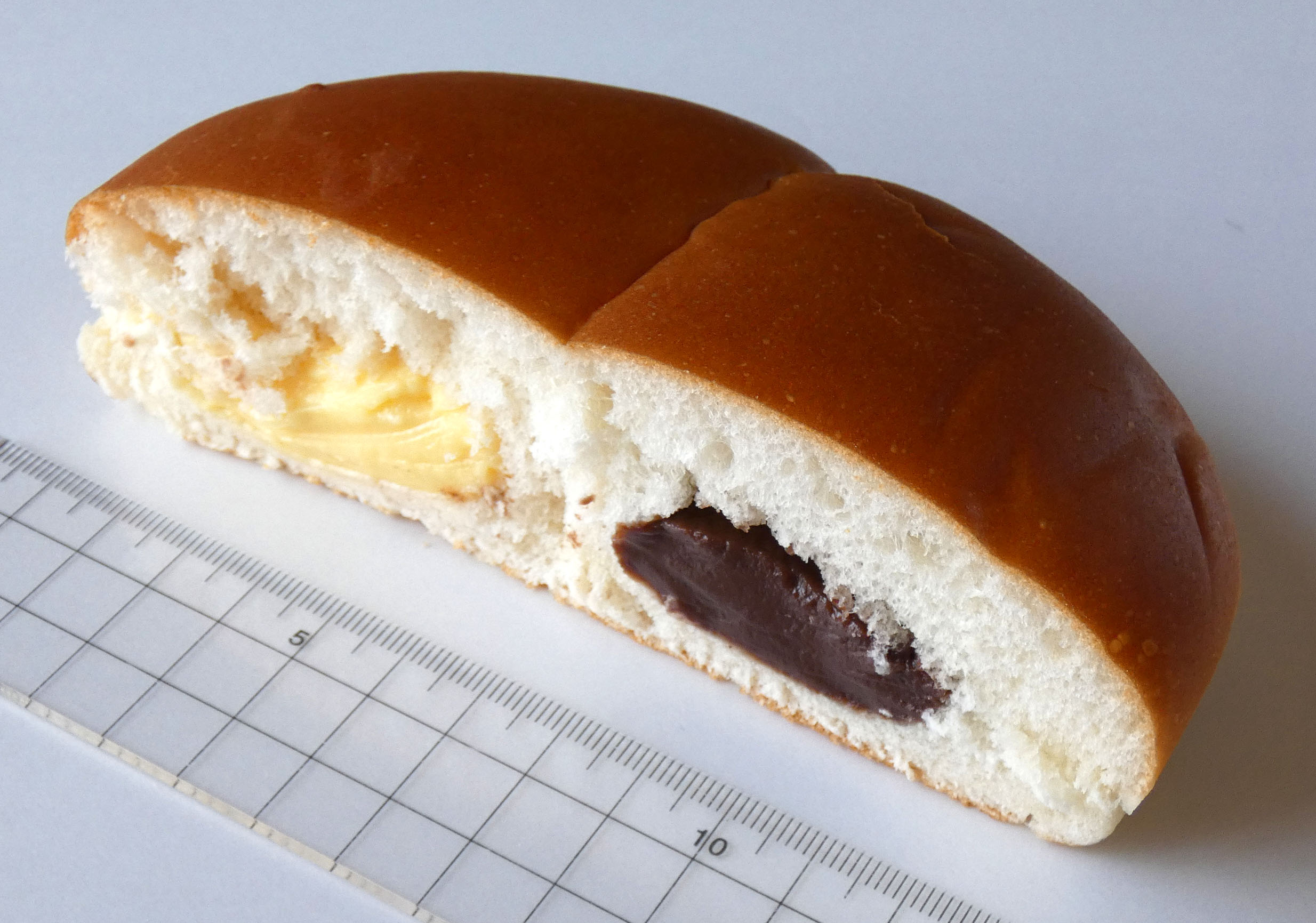 木村屋總本店 2色パン チョコ&クリーム